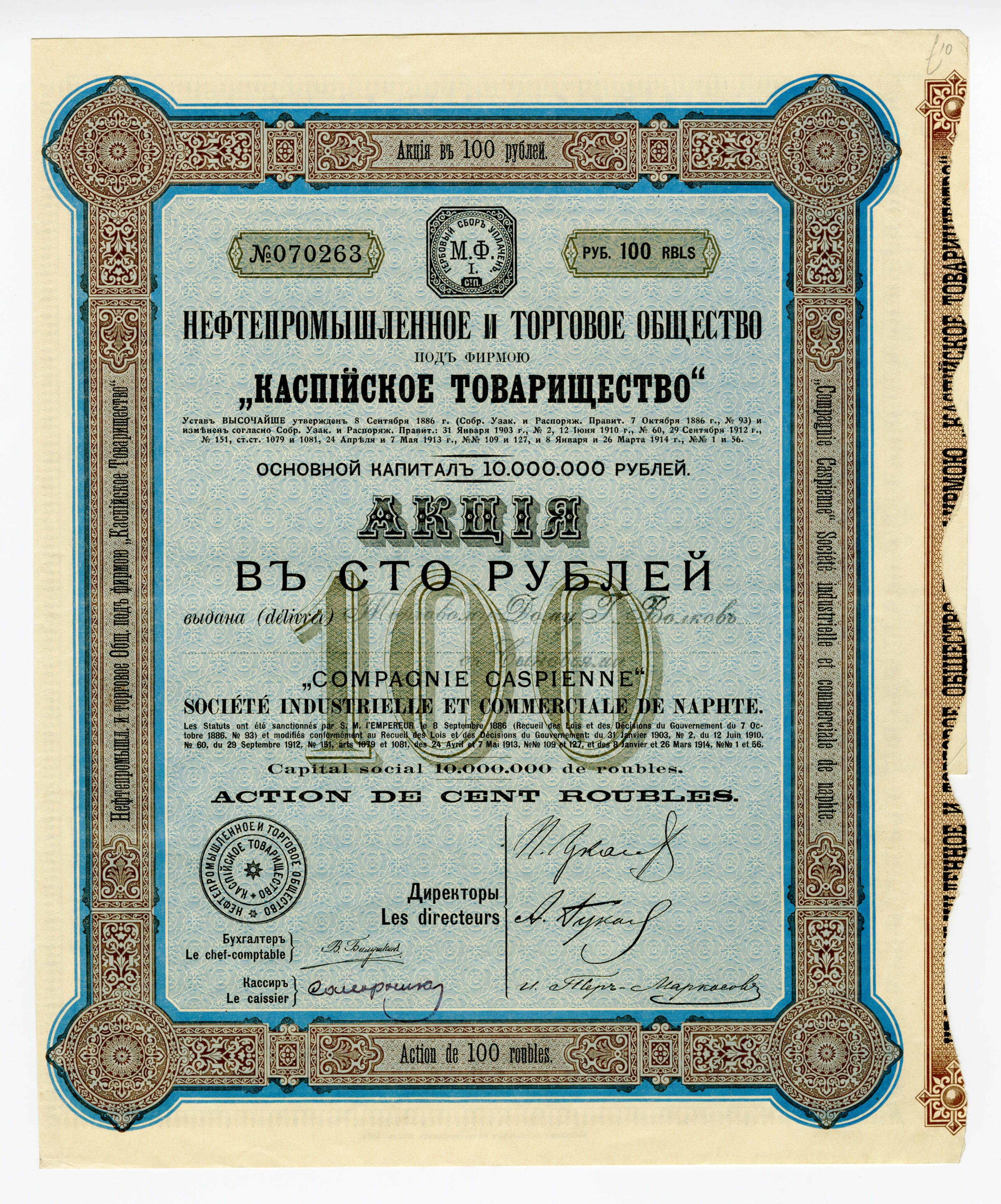 Акция именная в 100 рублей Нефтепромышленного и торгового общества под фирмою "Каспийское товарищество", выданная Торговому дому "Г. Волков".